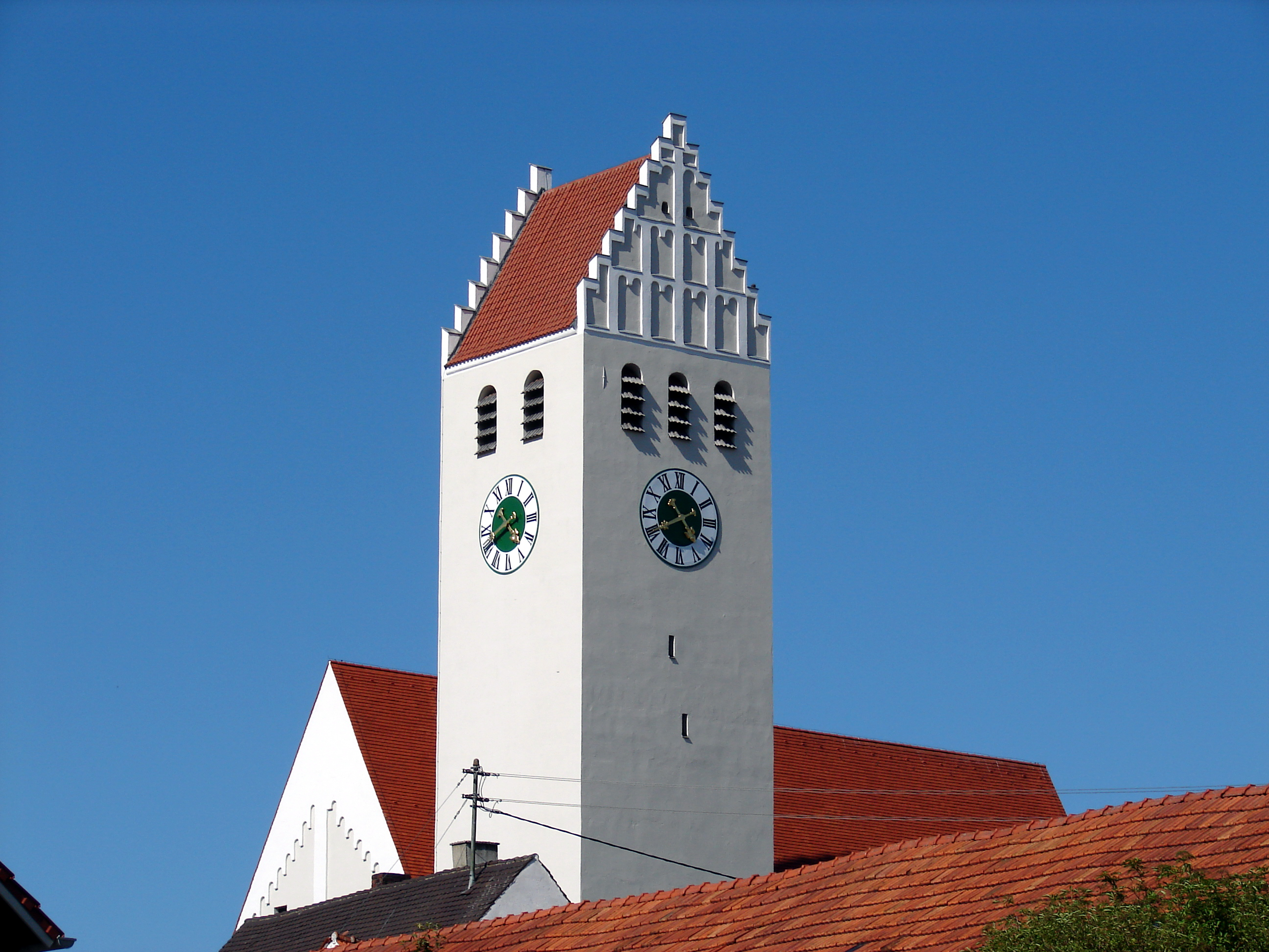 Die 3-schiffige Basilika wurde ca. 1200 n. Chr. erbaut und ist das Wahrzeichen von Ilmmünster. Sie zeugt von der großen Bedeutung Ilmmünsters in der Vergangenheit.